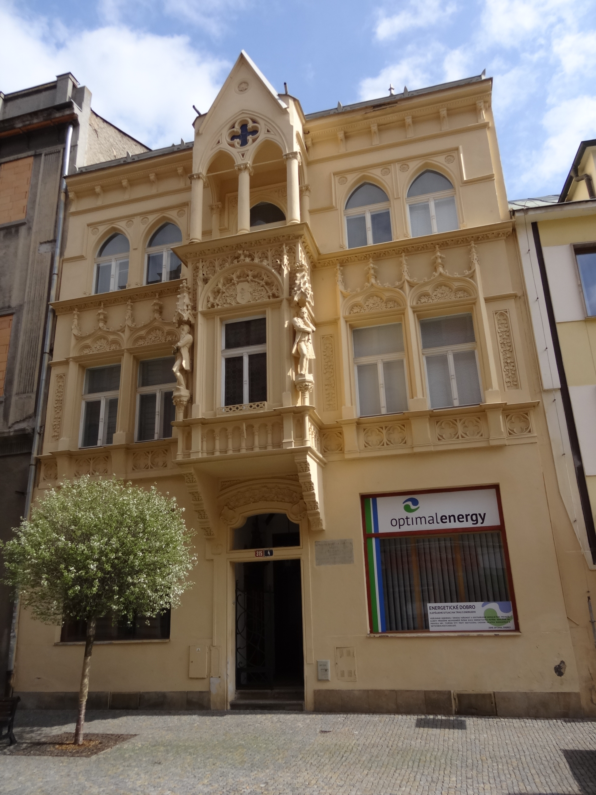 Dům čp. 315, Kollárova 315/4, Vnitřní Město, Kutná Hora.